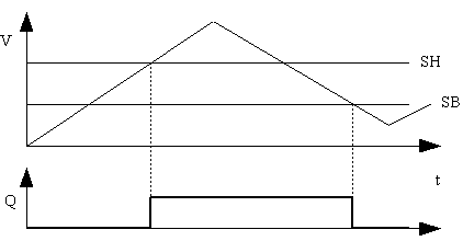 Bascule de Schmidt : diagramme temporel